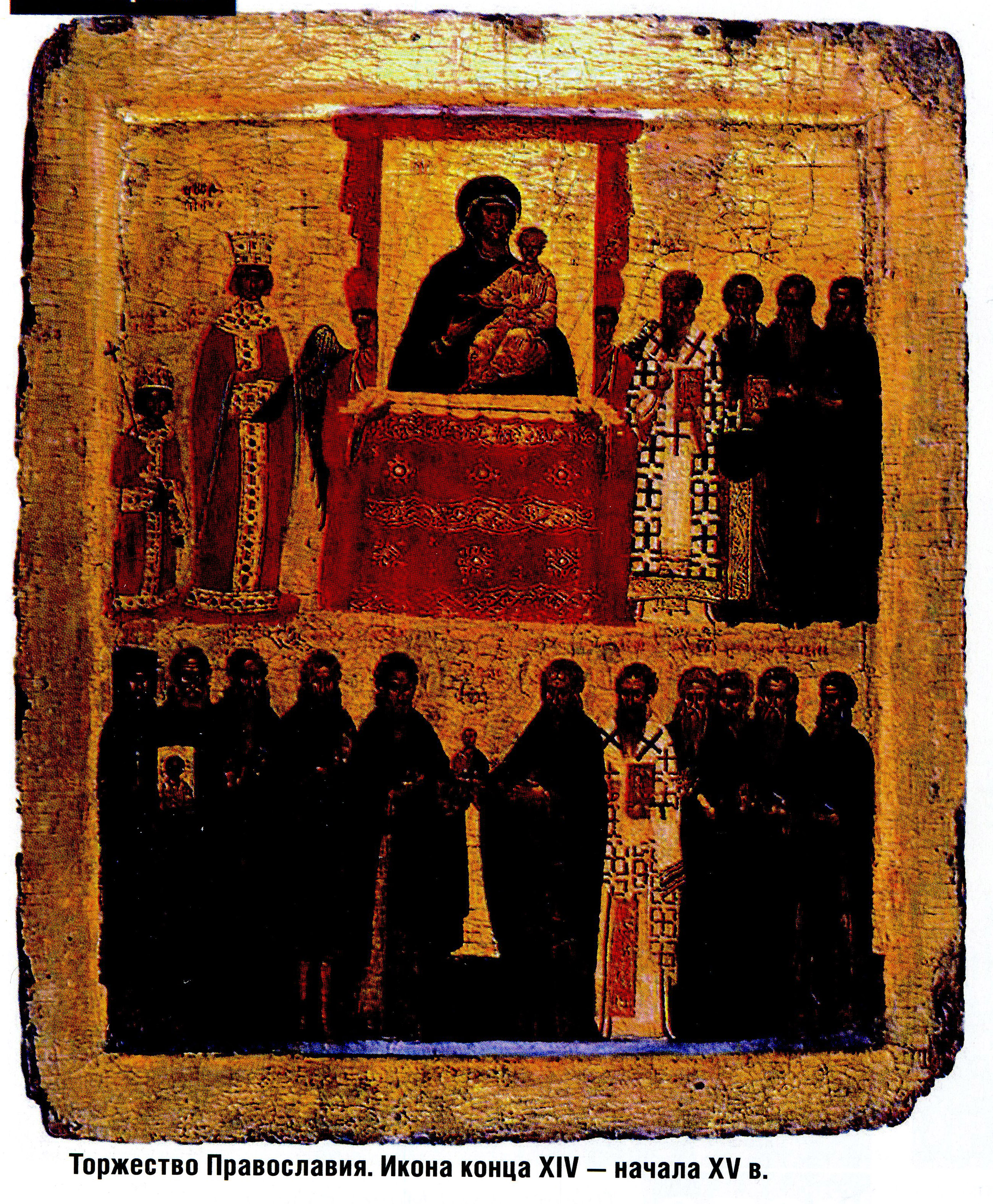 Конец XIV - начало XV века. Торжество православия